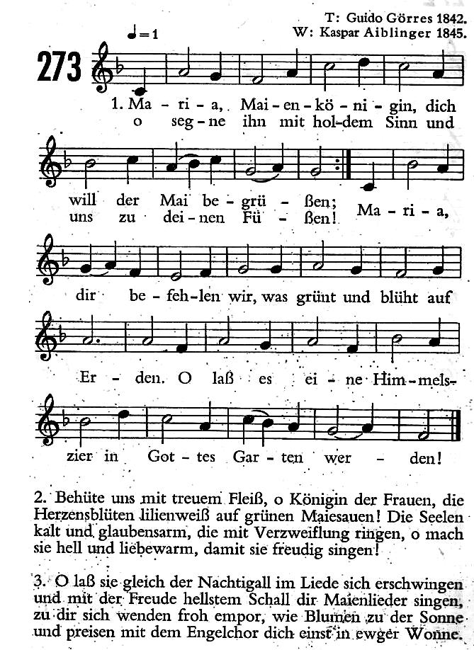 "Maria Maienkönigin", Text nach Guido Görres (1842) mit Ergänzungen, Melodie von Kaspar Aiblinger Quelle: Gebet- und Gesangbuch für das Erzbistum Köln, Verlag J.P. Bachem, Köln 1949, Nr. 273